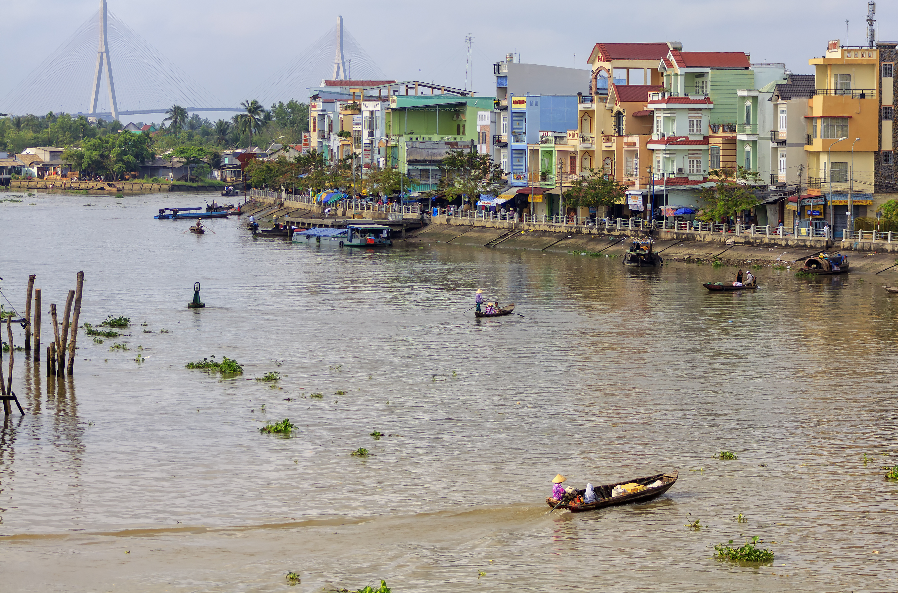 Nhà ven sông ở Cái Vồn, thuộc thị xã Bình Minh, tỉnh Vĩnh Long, Việt Nam.